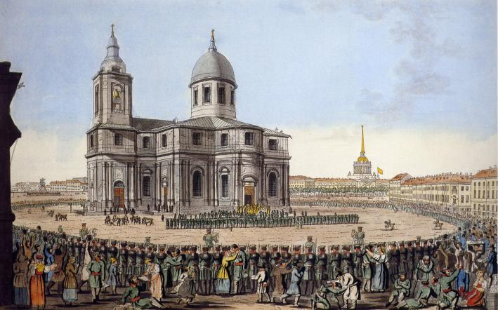 Торжественное возвращение с.-петербургского ополчения на Исакиевскую площадь, где было воздано Богу благодарственное моление. Июня 12 дня 1814 г. (И. Иванов). Church service in front of St. Isaac's Cathedral in celebration of the return of a local militia force from the Napoleonic wars (12 June 1814)